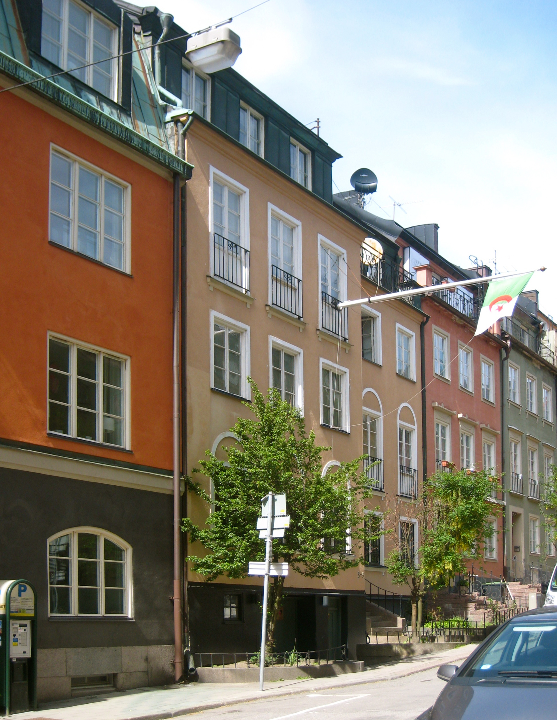 Danderydsgatan 3-5 (Näktergalen 39). Today the Algeria embassy in Sweden.